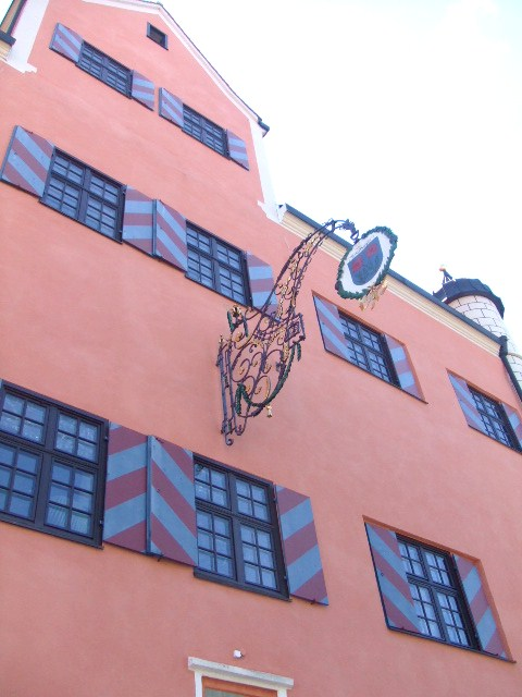 Schloss Unterthingau, Gemeinde Unterthingau, Landkreis Ostallgäu